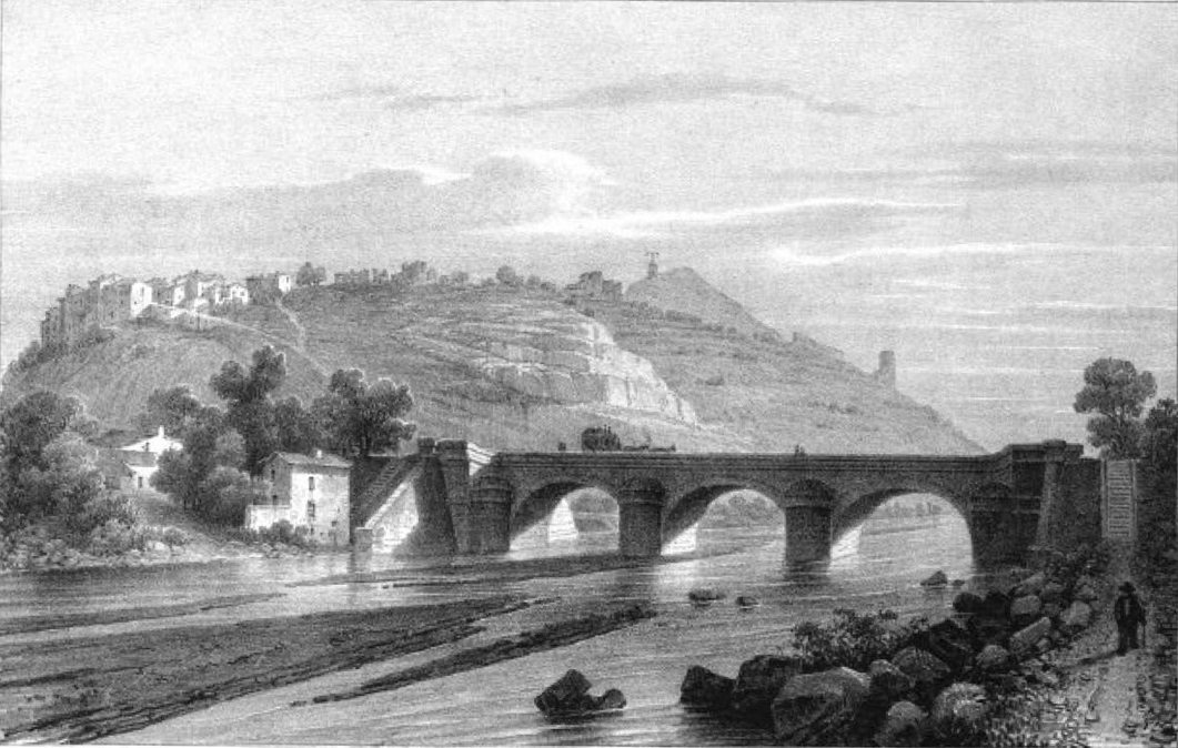 Album du Dauphiné - tome IV, litographie du pont sur la drome à Livron